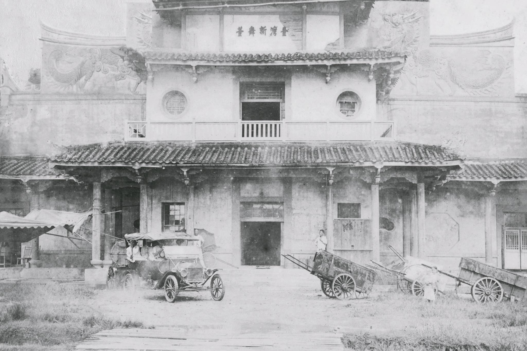 臺灣新舞臺。